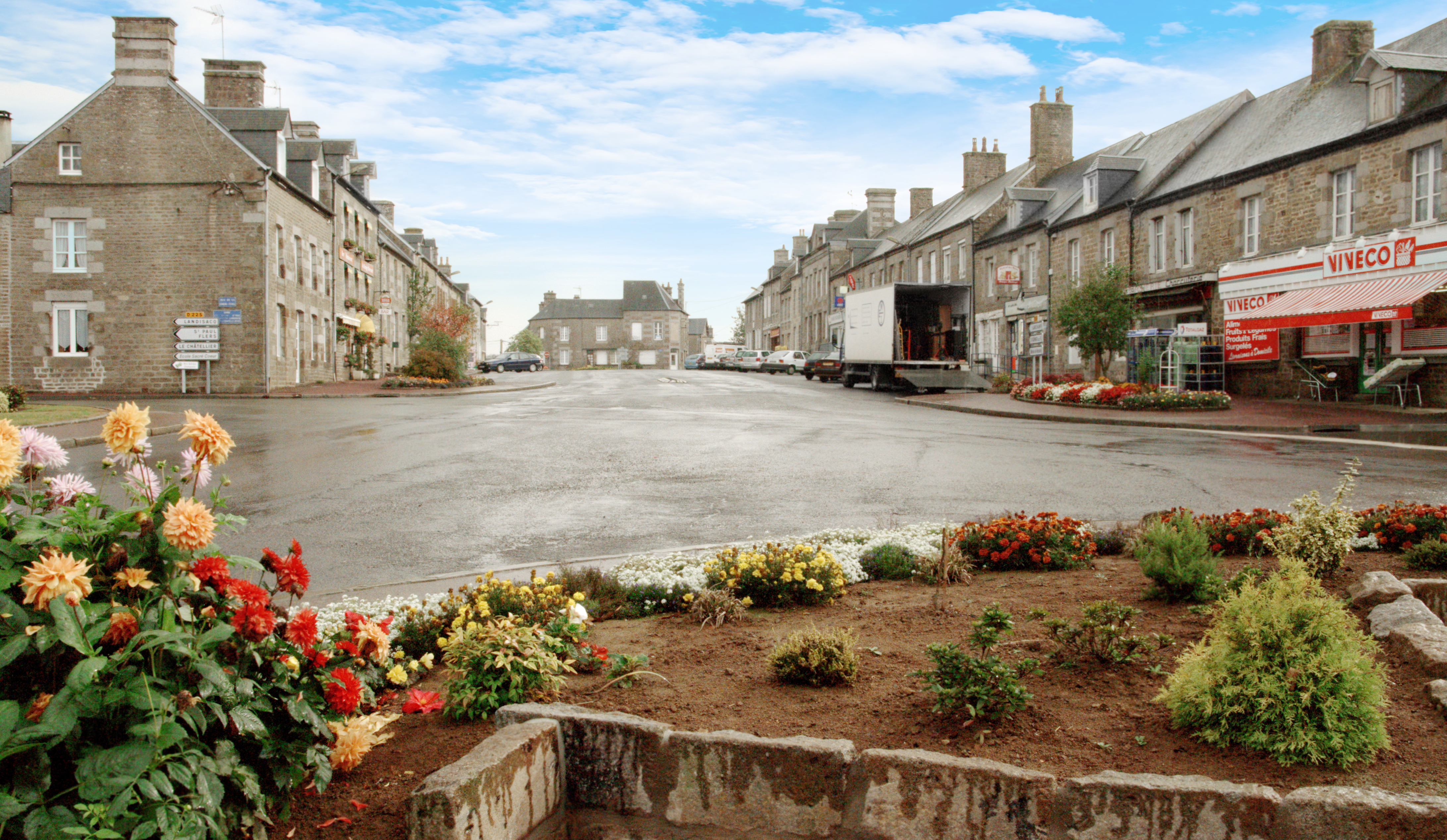 La place du bourg de Chanu un jour de pluie, département de l'Orne.